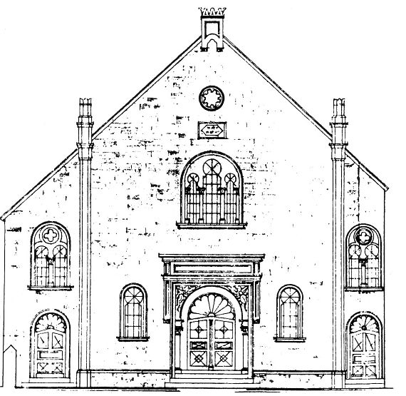 Bauzeichung der Synagoge in Mayen